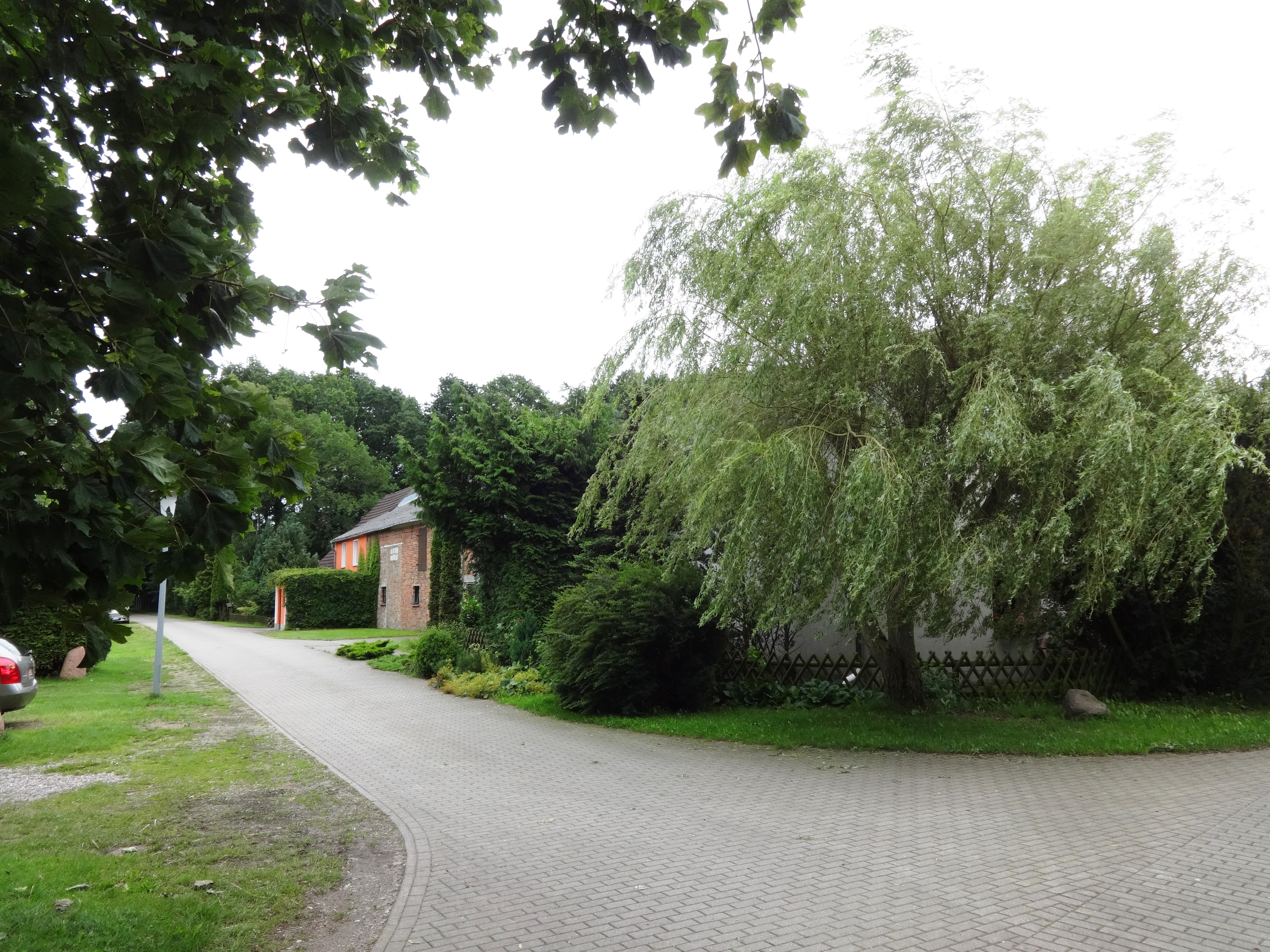 Kräpelin, ein Ortsteil der Gemeinde Brünzow in Mecklenburg-Vorpommern